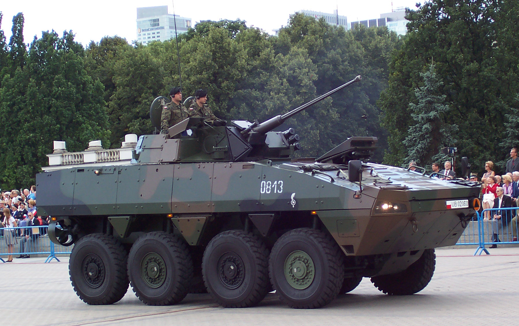 KTO Rosomak, 15 sierpnia 2006 - pl. Piłsudskiego